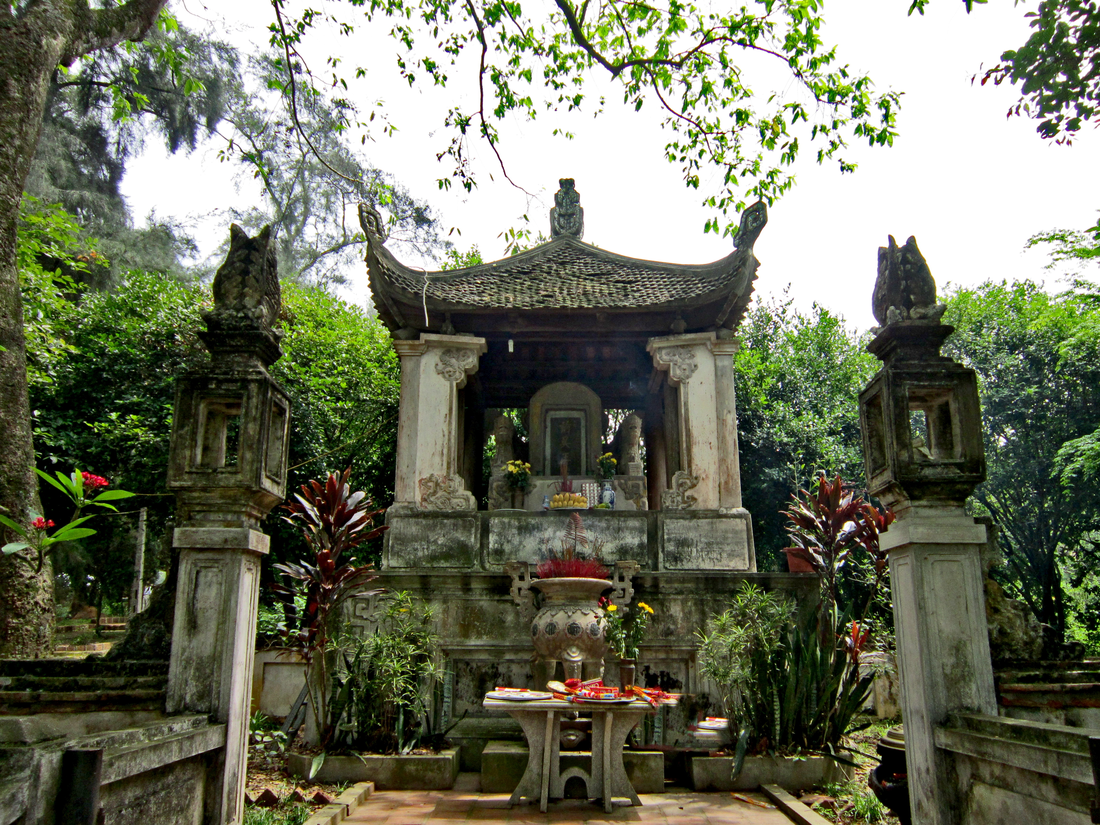 Lăng Ngô Quyền (898 - 944, còn được biết đến với tên gọi Tiền Ngô Vương) ở thôn Cam Lâm trong Làng cổ Đường Lâm, thuộc thị xã Sơn Tây (Hà Nội, Việt Nam).